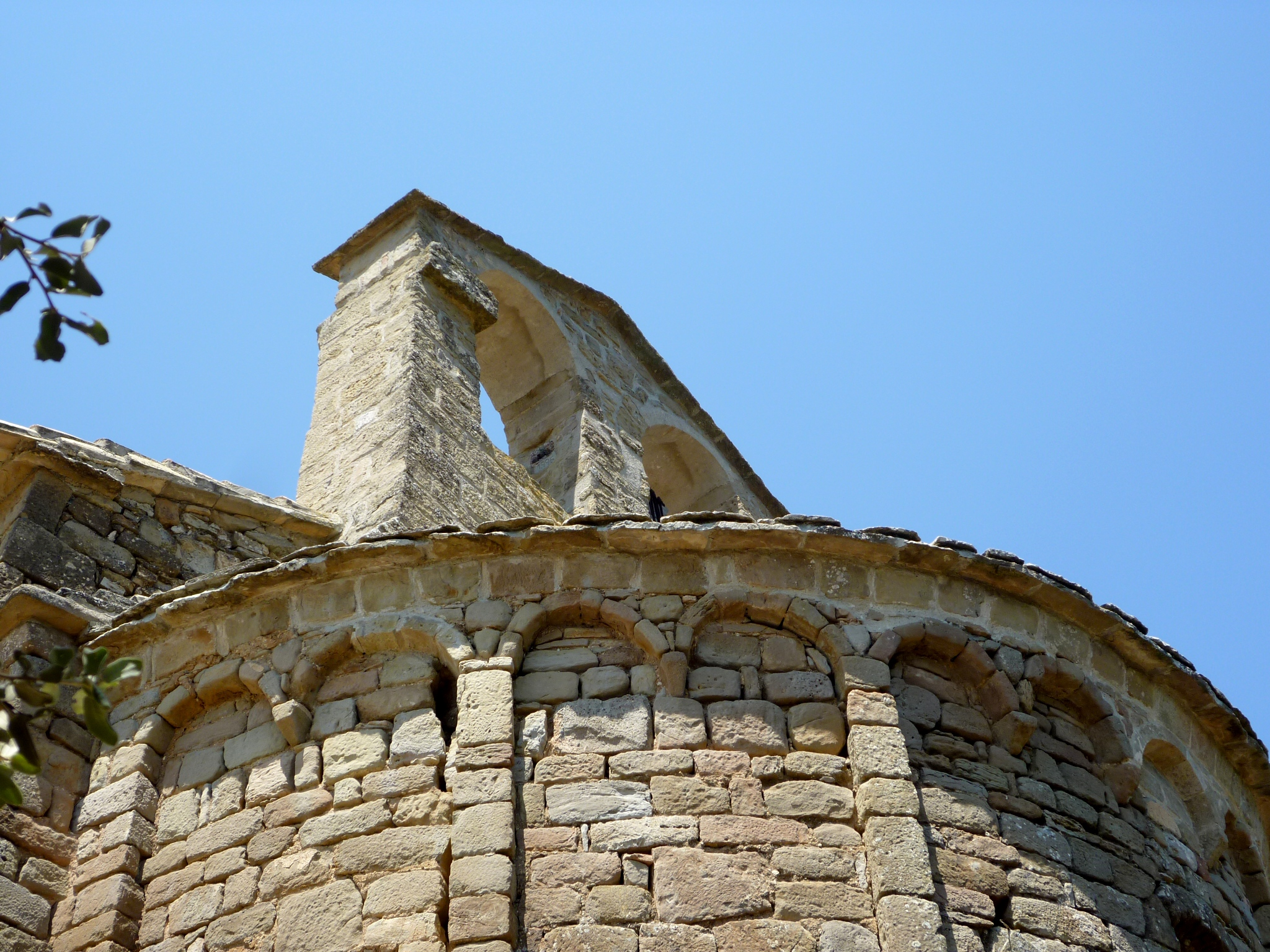 Església parroquial de Sant Miquel de Valldàries (Vilanova de l'Aguda): absis i espadanya